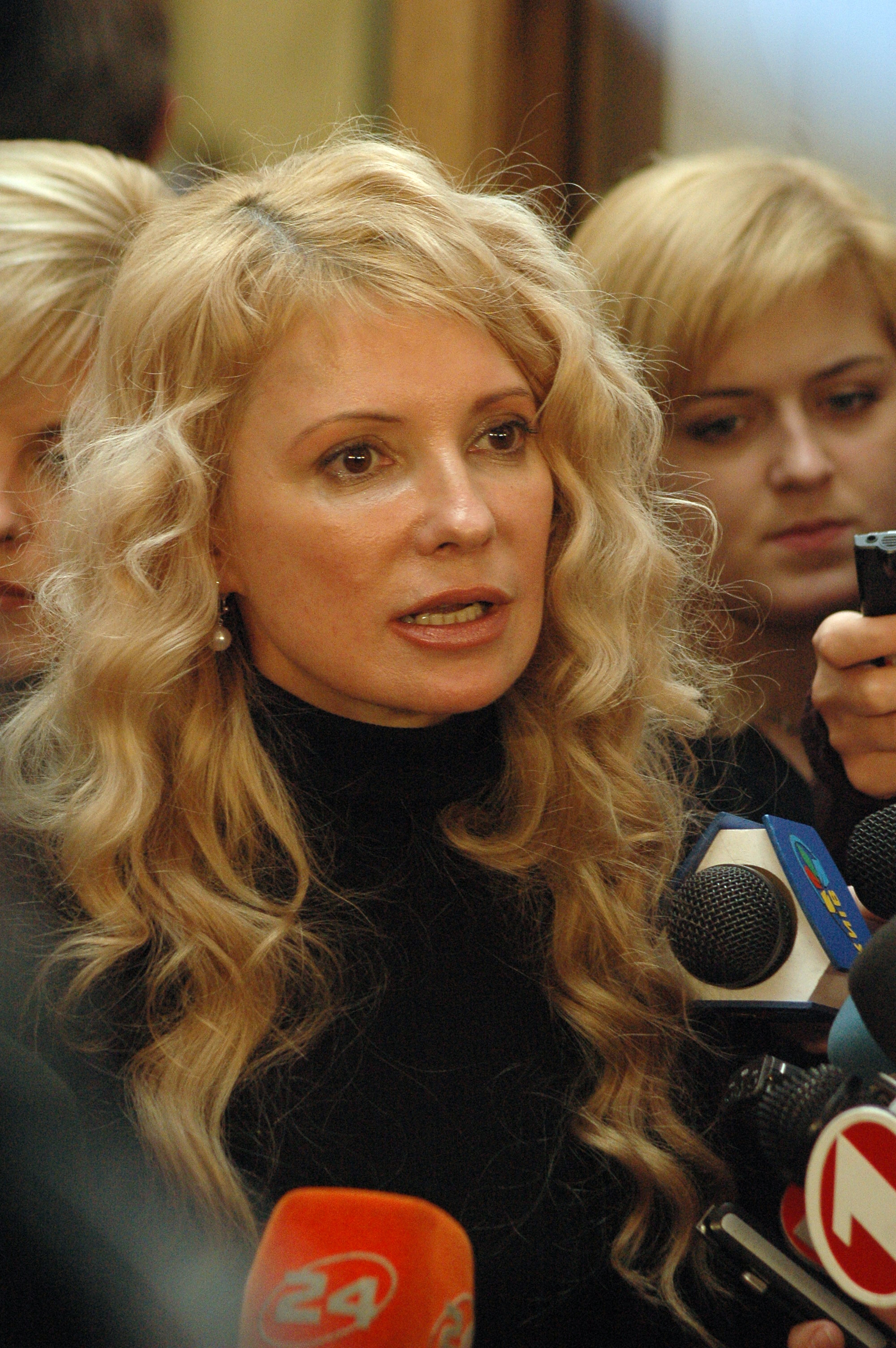 Julia Timoshenko without "kosa"